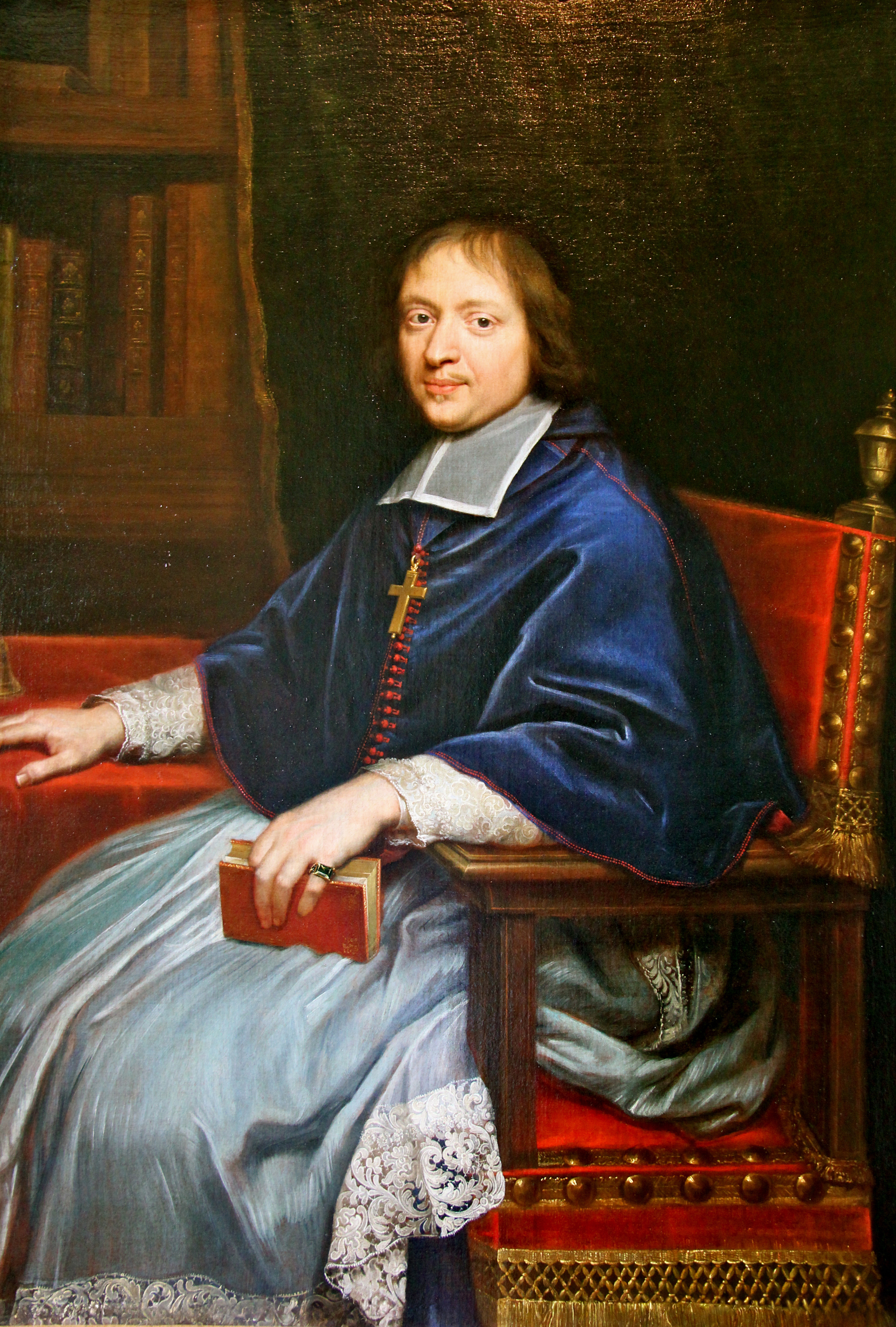 Site de Renaud Camus : bio-bibliographie, journal, Le Jour ni l’Heure, chronologie, livres & textes en ligne (librairie/bookshop), site du château de Plieux (histoire, description, conditions de visite), tableaux, etc.